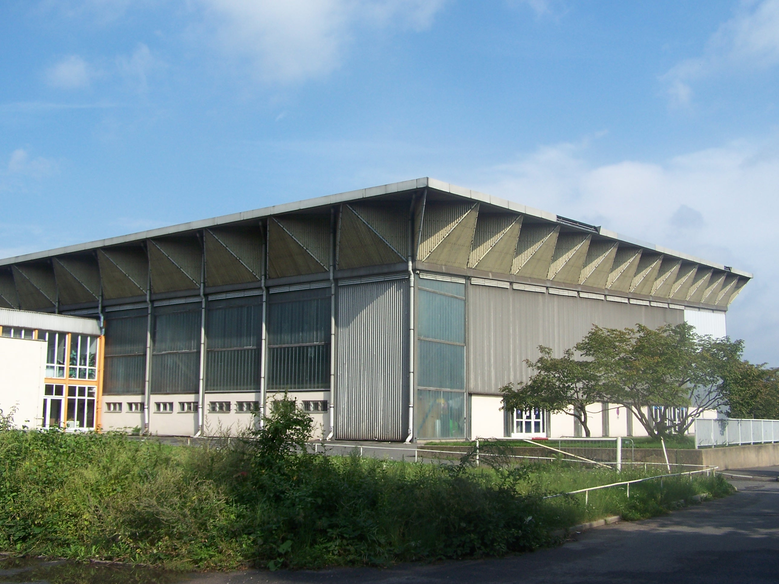 Eissporthalle Pieschner Allee in Dresden; Spielstätte der Dresdner Eislöwen bis 2007